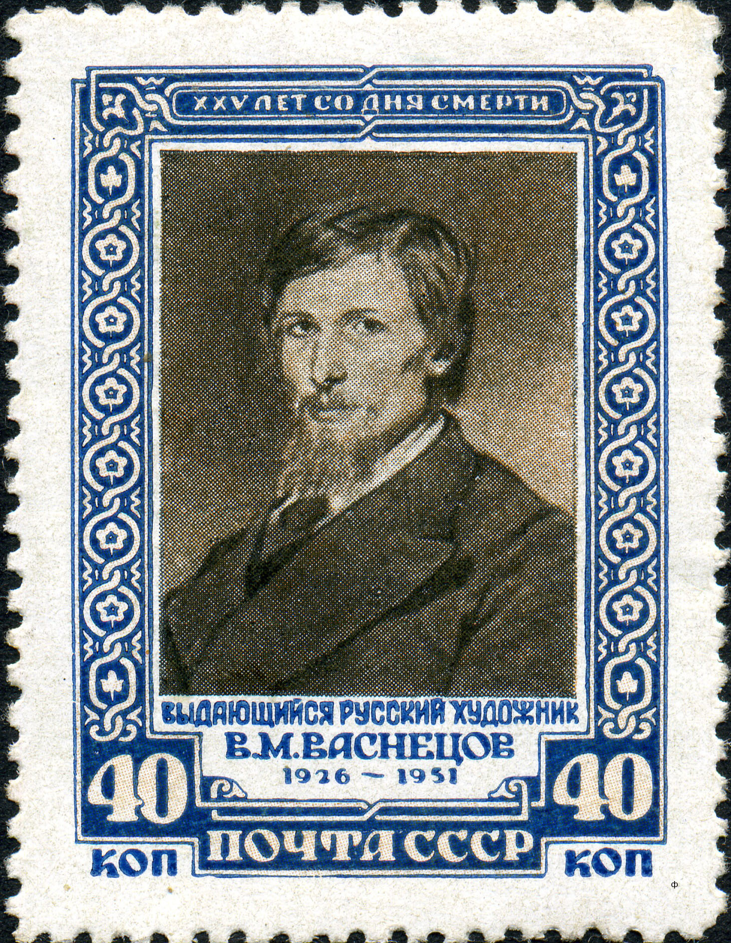 Марка СССР